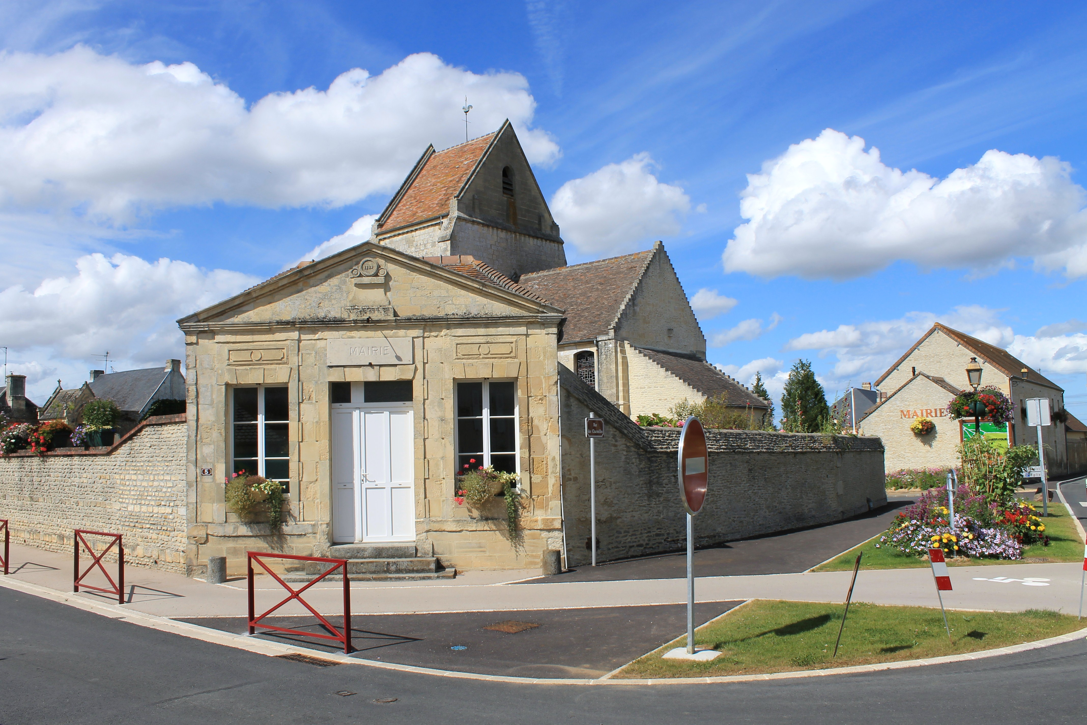 mairie et église de Hubert-Folie (Calvados)